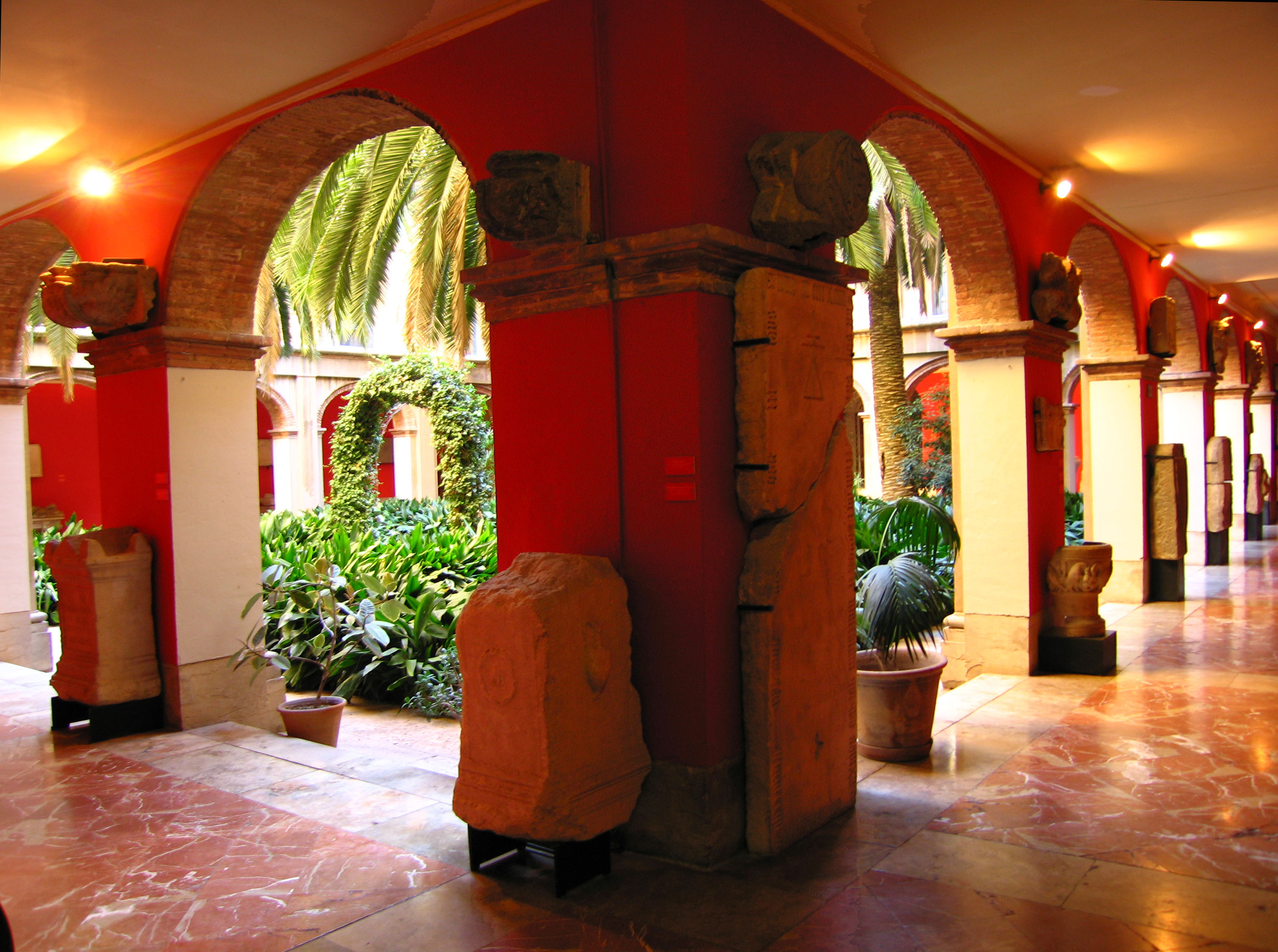 Claustre de Sant Pius V, València.